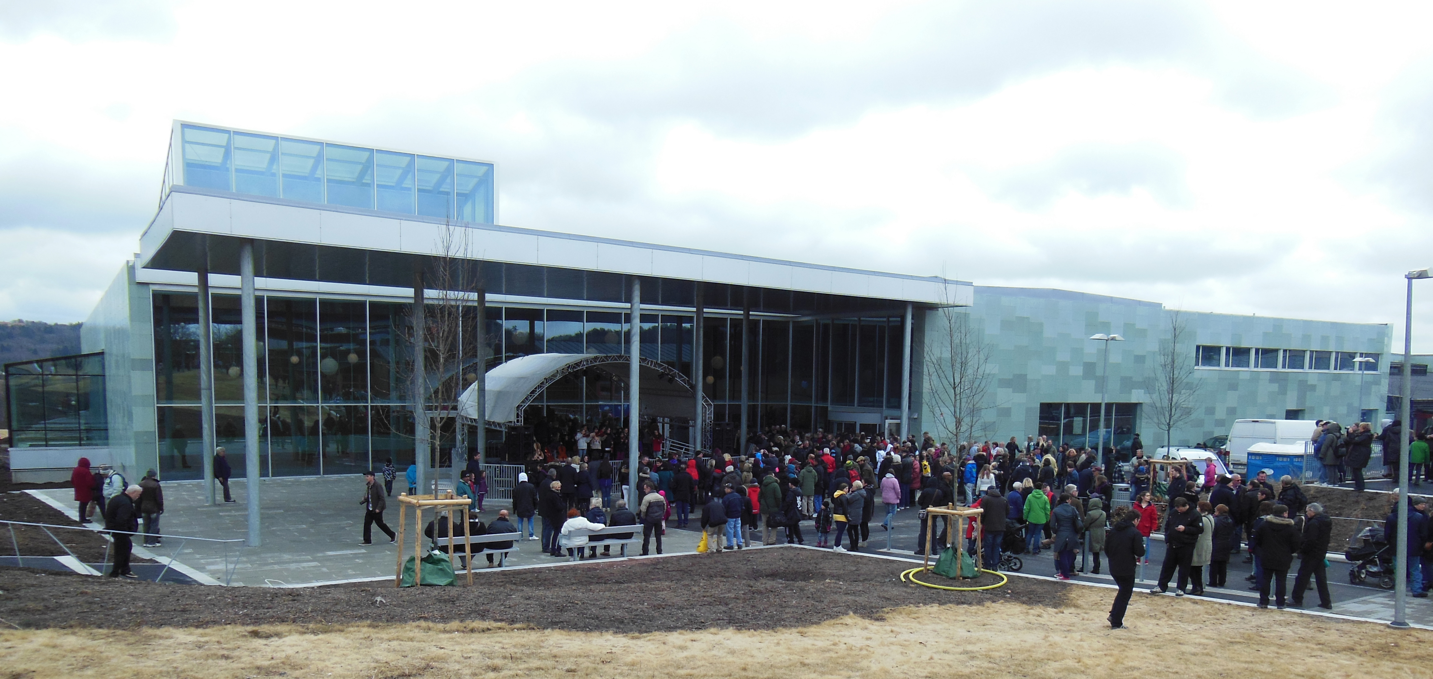 Angered Arena på invigningsdagen.